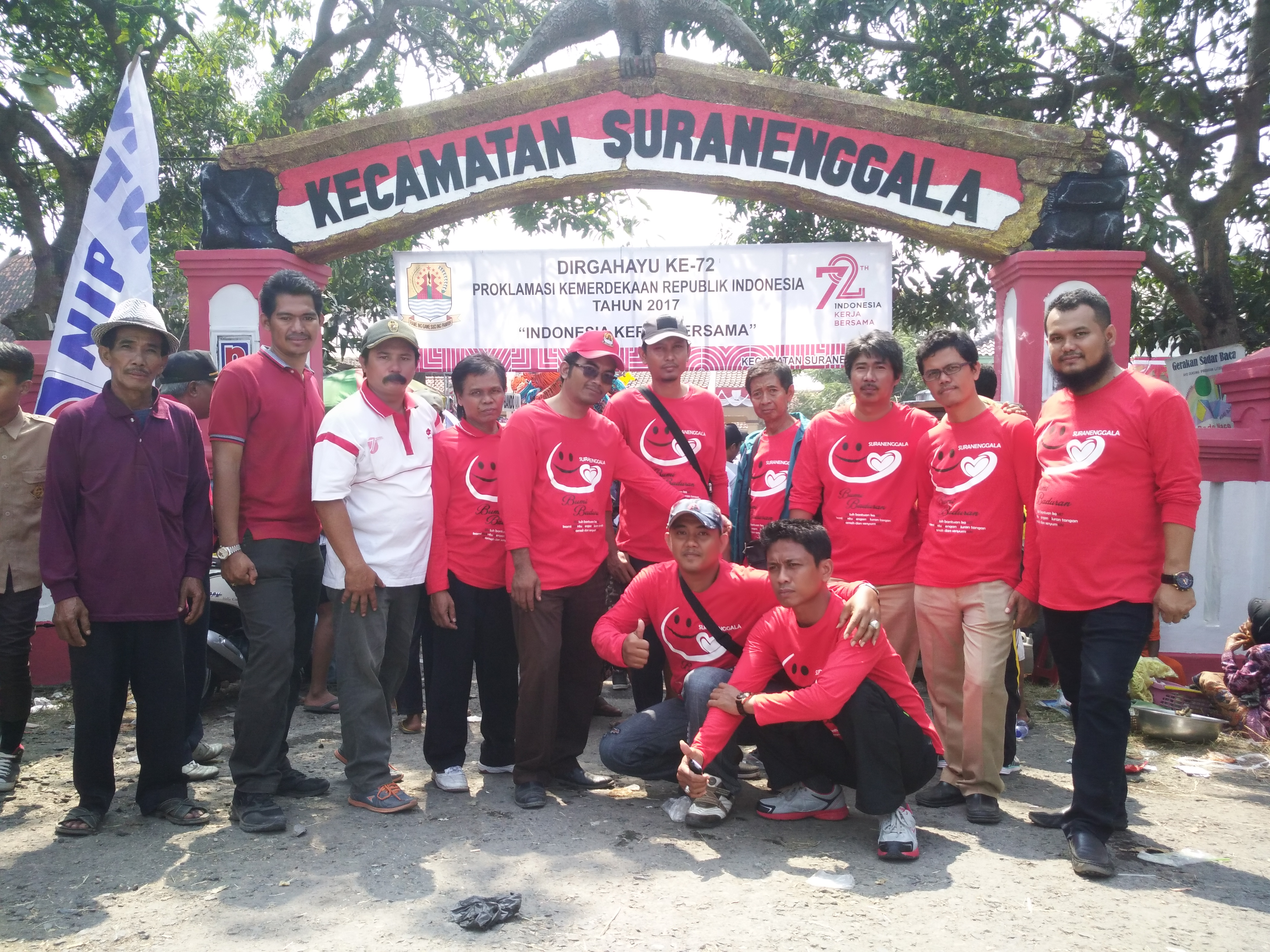 Kondisi Existing Kecamatan Suranenggala